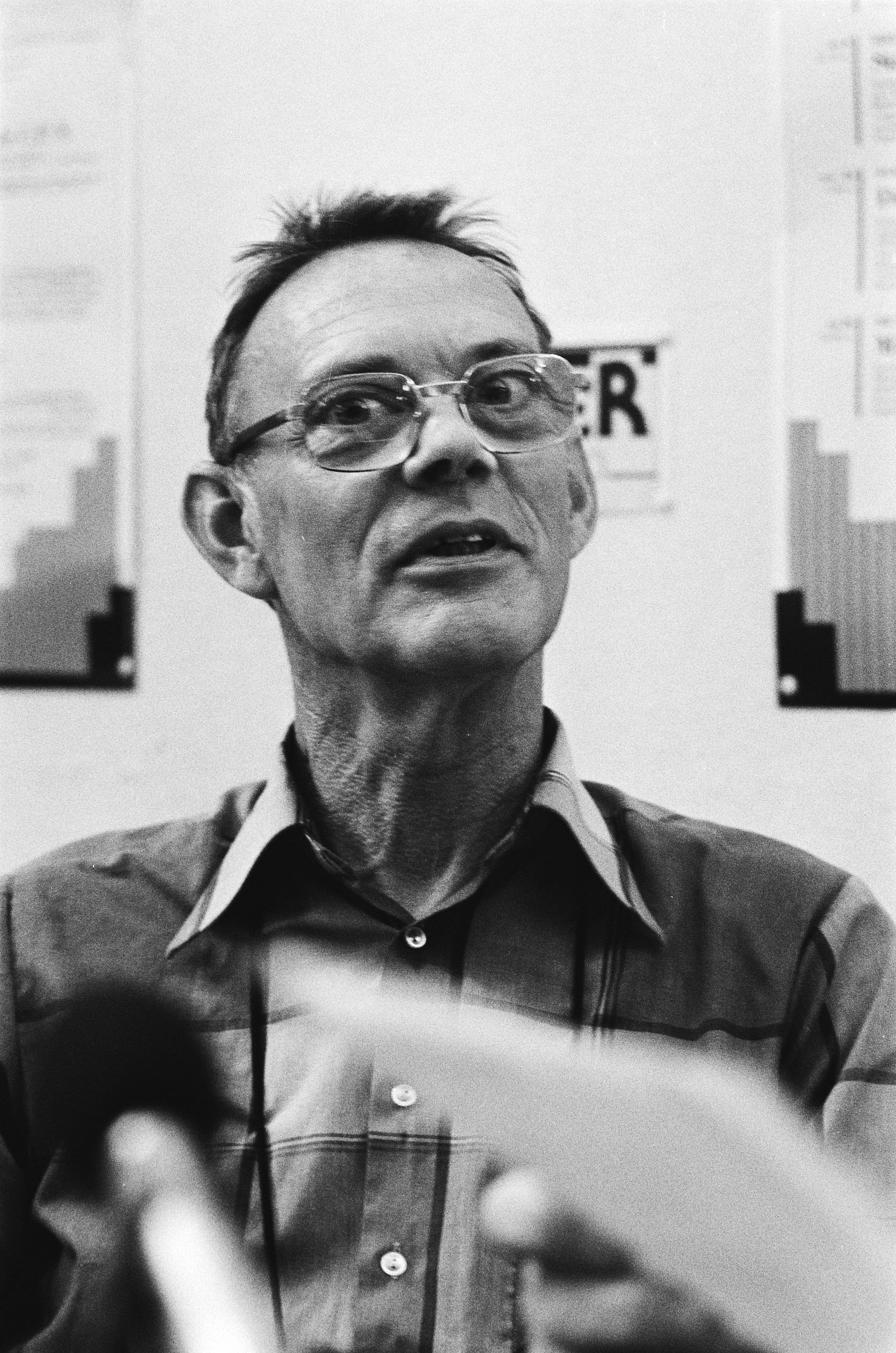 Discussie tussen CPN-ers en destijds geroyeerde CPN-ers o over rapport "De CPN in de oorlog" in De Populier in Amsterdam; Prof. Harmsen (geschiedkundige). 6 juni 1982